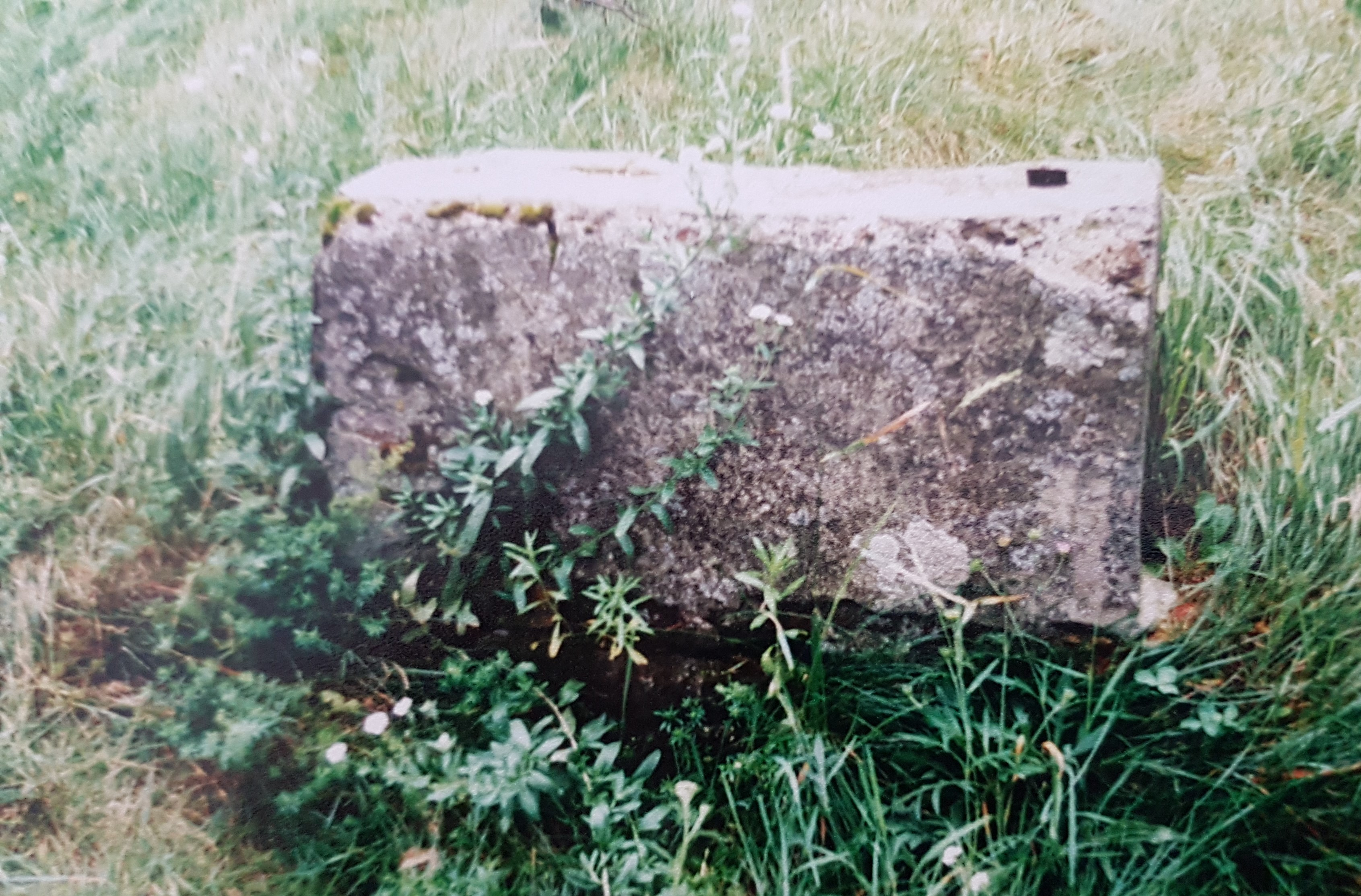 מצבה ליד קבר אחים ליהודים שנרצחו לאחר חיסול גטו לאסק ב 24.8.1942, קודם הגירוש.